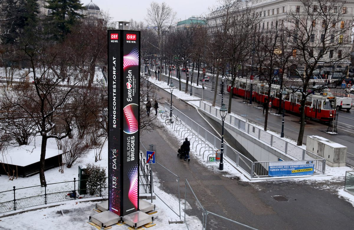 Вена в символике Евровидения 2015